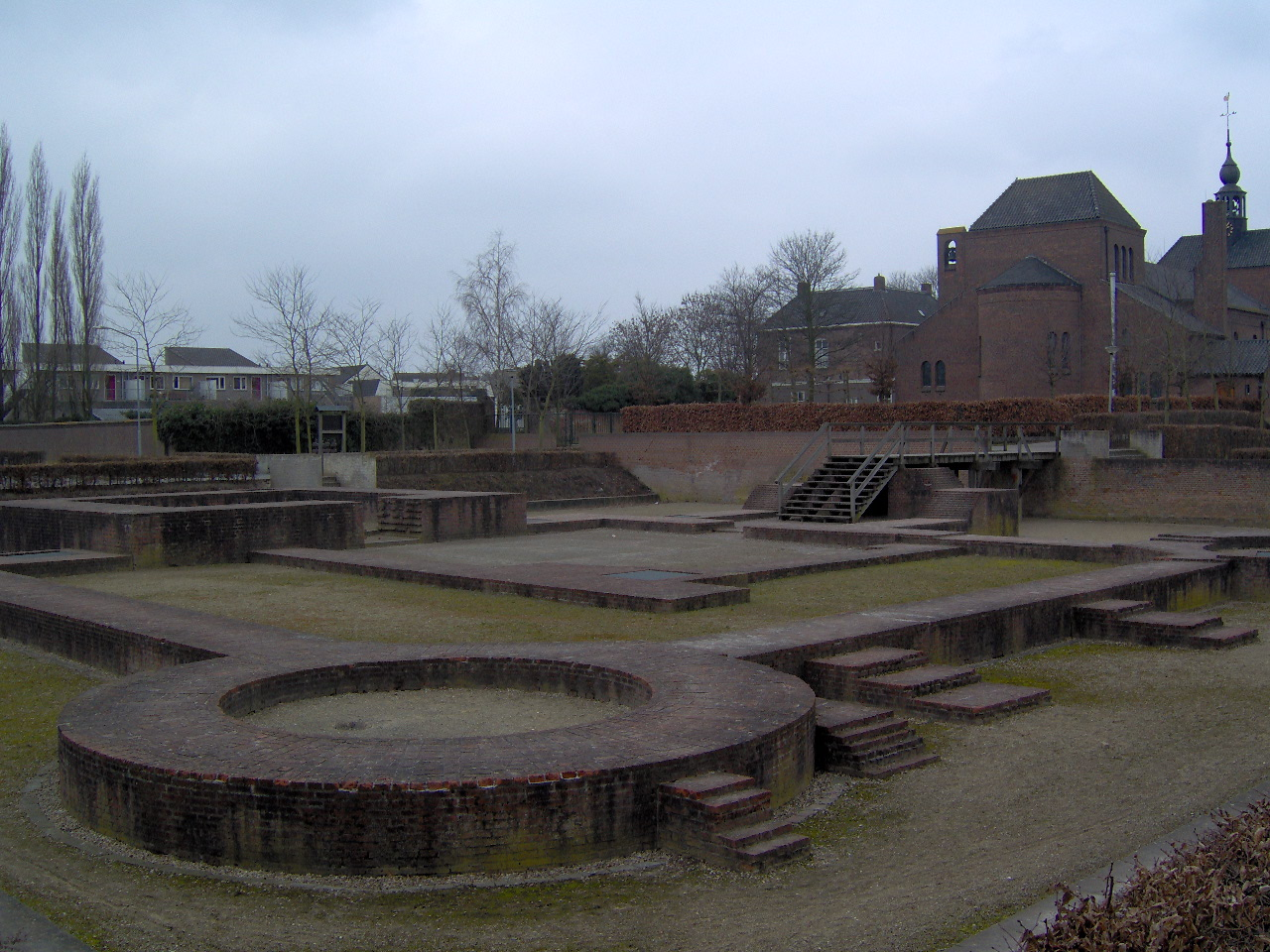 eigen foto